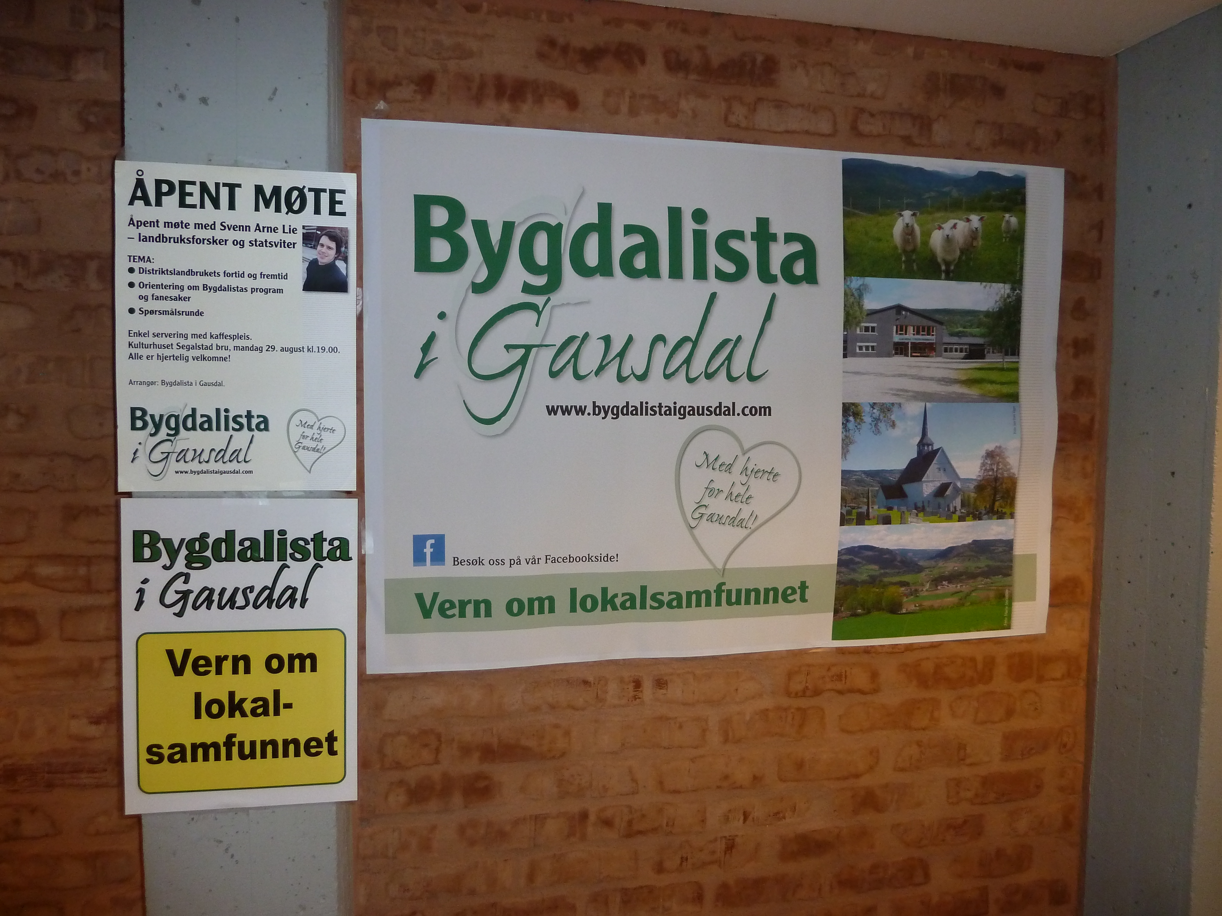 Valg 2011